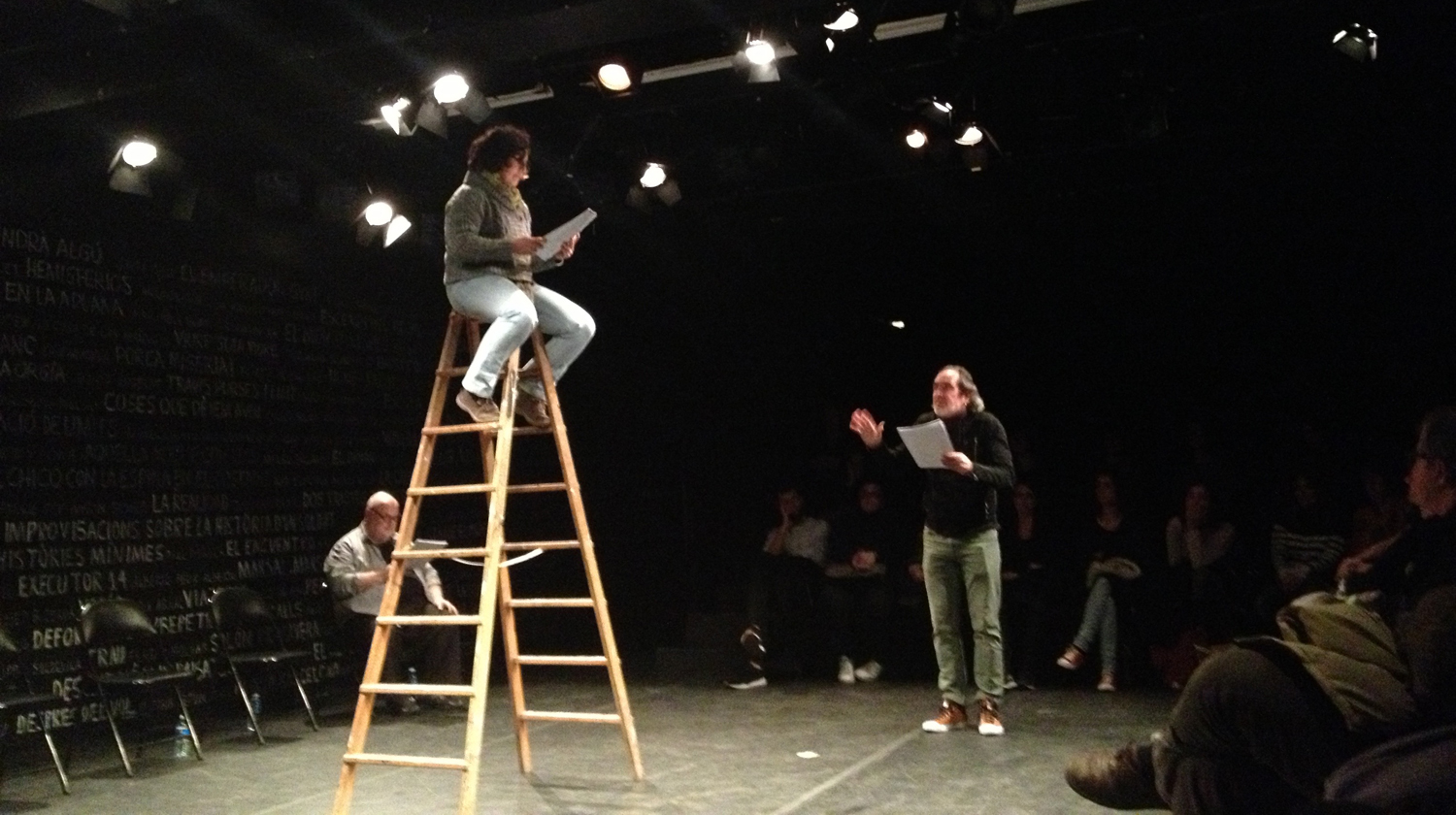 Lectura dramatizada de El gran teatro natural de Oklahoma en la Sala Beckett de Gracia.